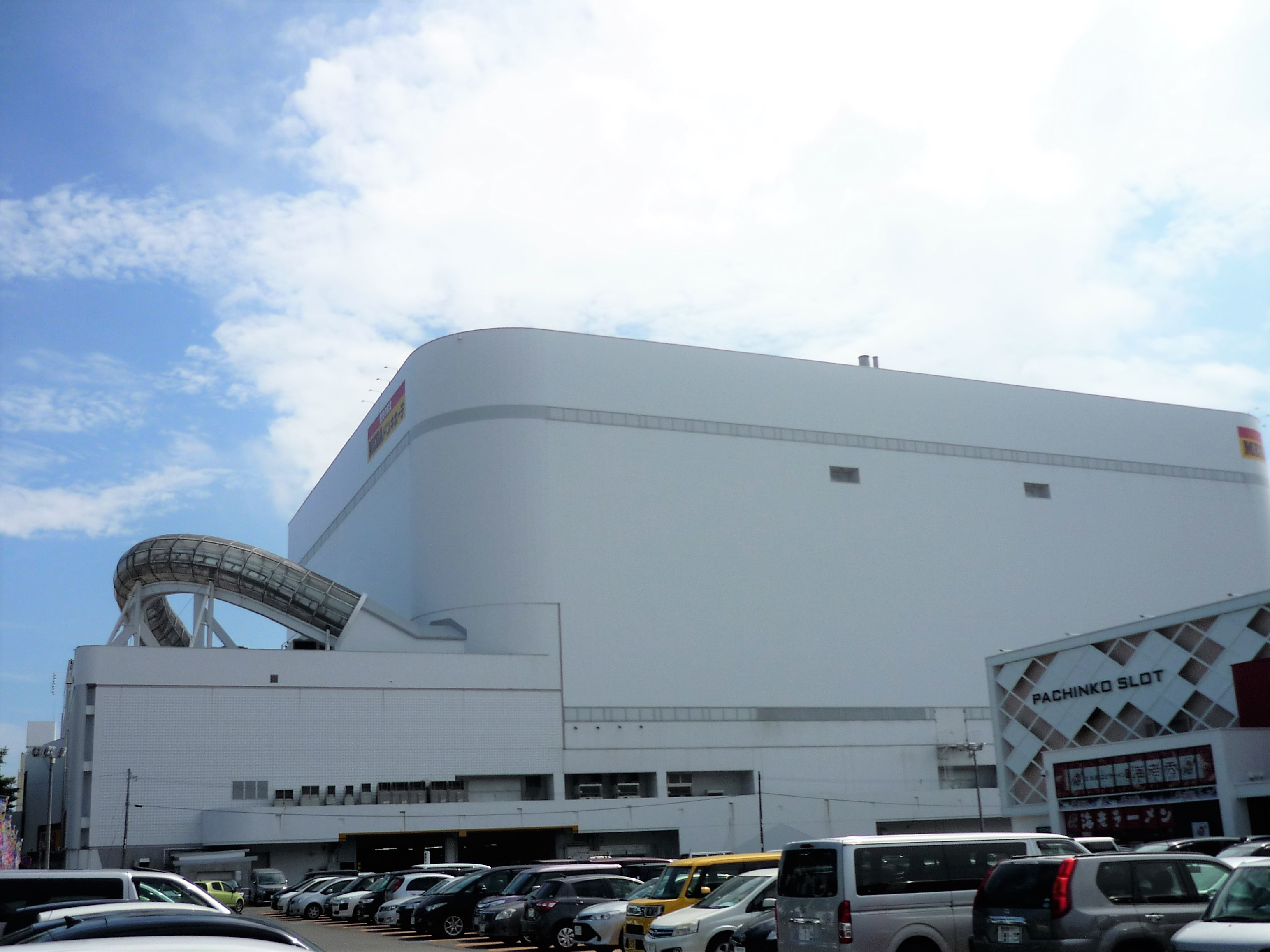 MEGAドン・キホーテ苫小牧店（苫小牧駅北口、旧「ファンタジードームとまこまい」→「長崎屋苫小牧店」（2代目））